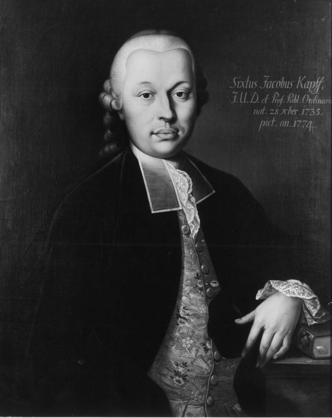 Sixt Jakob von Kapff (* 28. Dezember 1735 in Plüderhausen (Schorndorf, Würt.); † 18. Novbr. 1821)